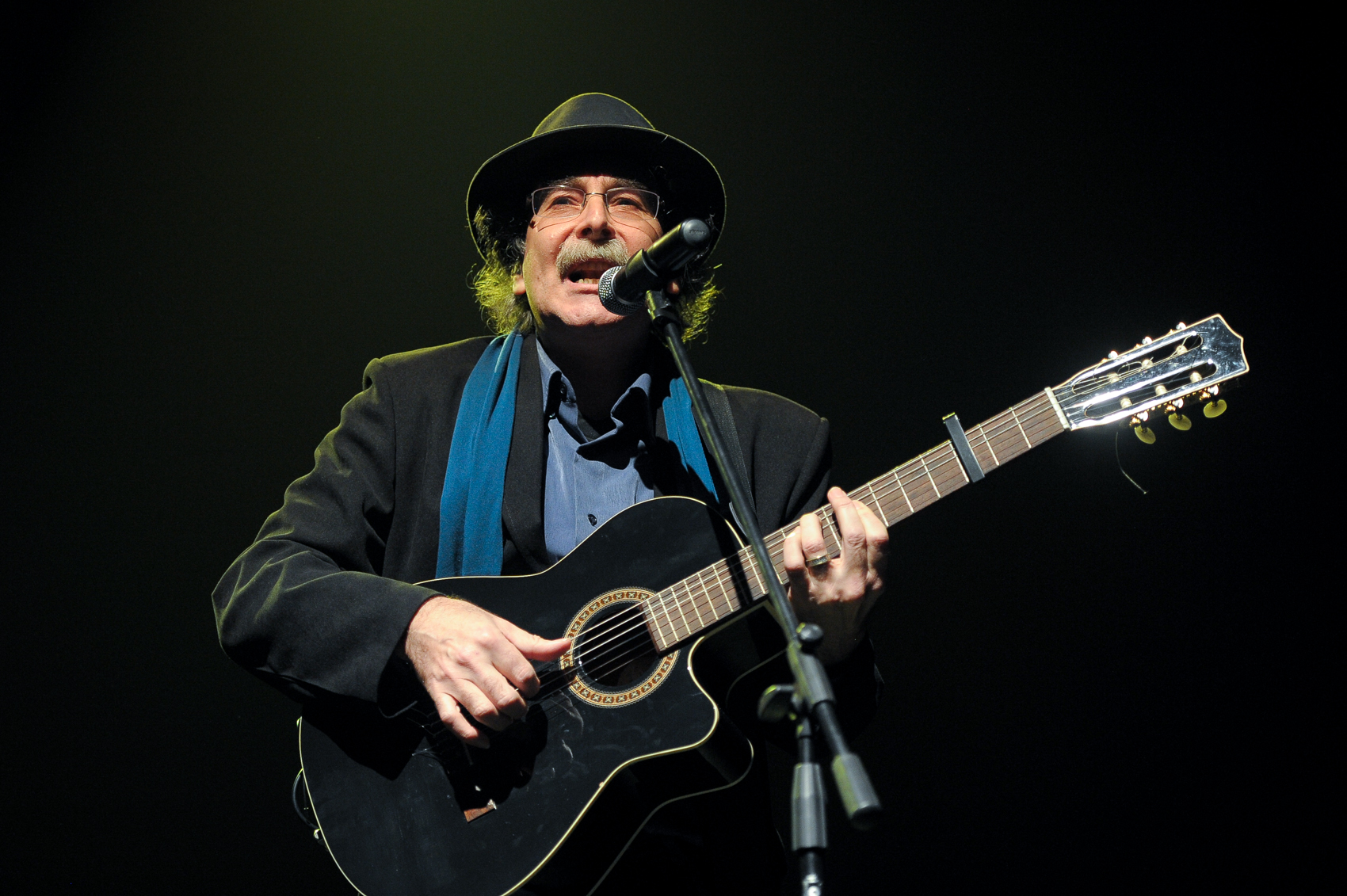 Actuación en el Teatro Solís. Foto: Santiago Barreiro